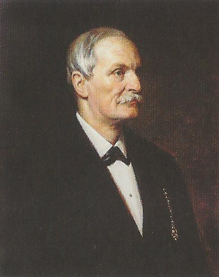 Porträt von Adalbert Nikolaus Fuchs (1814–1886), im Studienjahr 1869/70 Rektor des k.k. Polytechnischen Institutes Wien